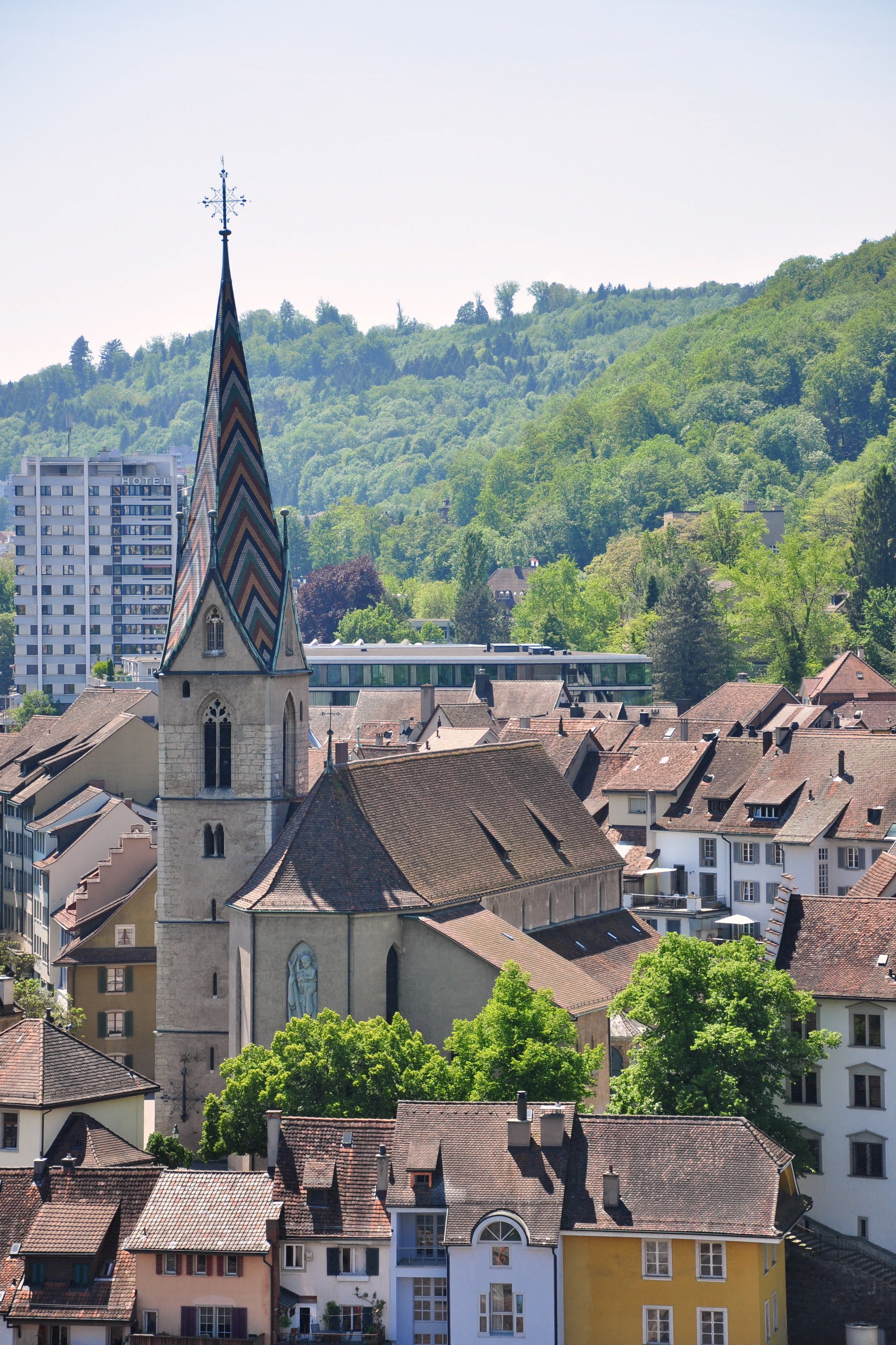 Stadtkirche in Baden as seen from Schartenfels in Wettingen (Switzerland)